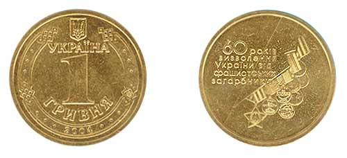 1 гривня: Монета 60 років визволення України